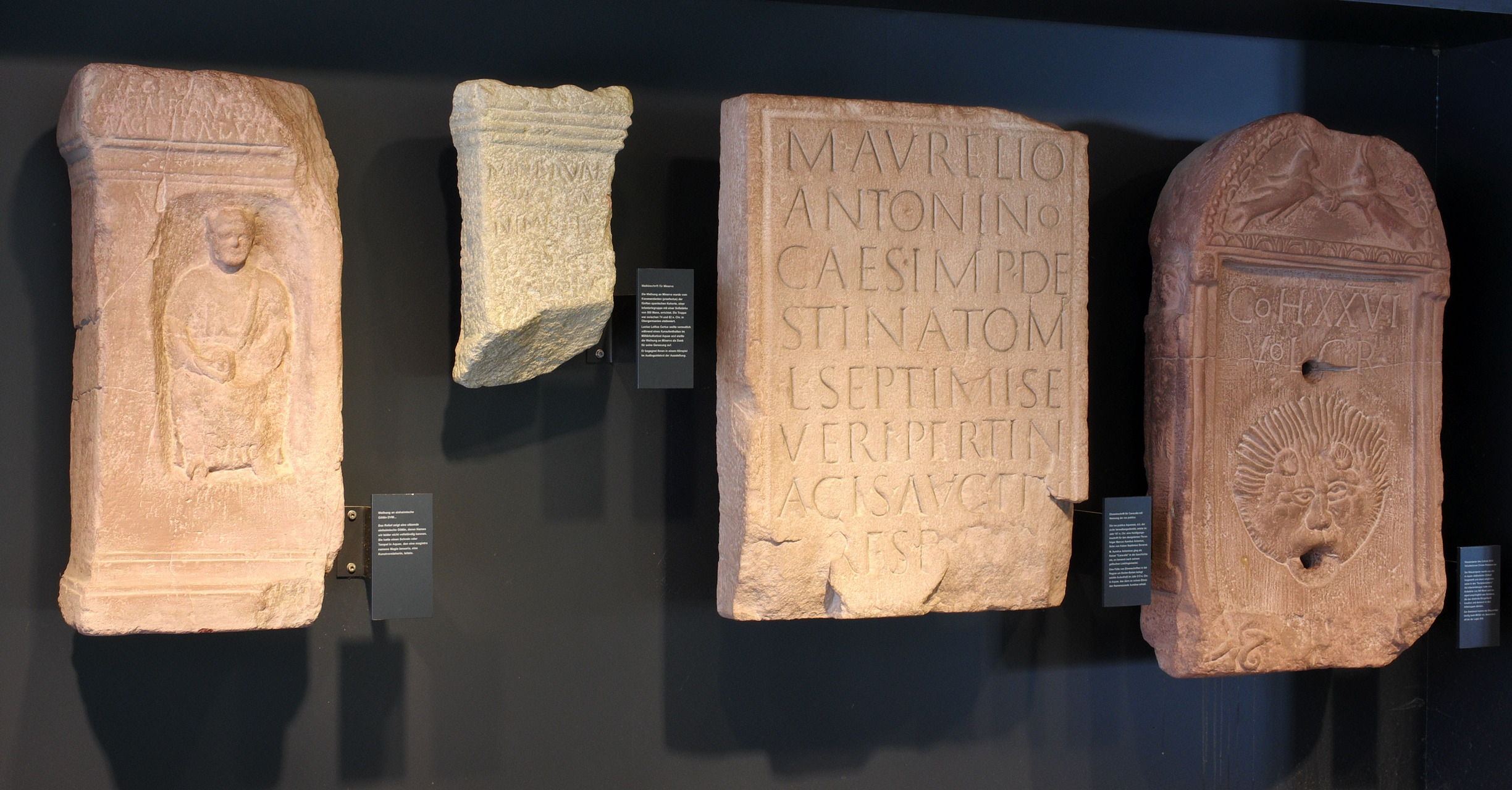 Kopien römerzeitlicher Funde aus Baden-Baden, ausgestellt am Römerplatz. a/ CIL XIII 6296: dum[---]o[---] / Magai(a)e Ianuaria[e ---] / magistra dum[---] b/ CIL XIII 6295 = AE 1899, 192: Minervae / sacrum / Nympheros / L(uci) Lolli Certi / praef(ecti) coh(ortis) V (Hi)sp(anorum?) / [ c/CIL XIII 6300: M(arco) Aurelio / Antonino / Caes(ari) Imp(eratori) de/stinato Imp(eratoris) / L(uci) Septimi Se/veri Pertin/acis Aug(usti) fili/o res p(ublica) Aqu(ensium) d/ CIL XIII 6307: Coh(ors) XXVI / vol(untariorum) c(ivium) R(omanorum)